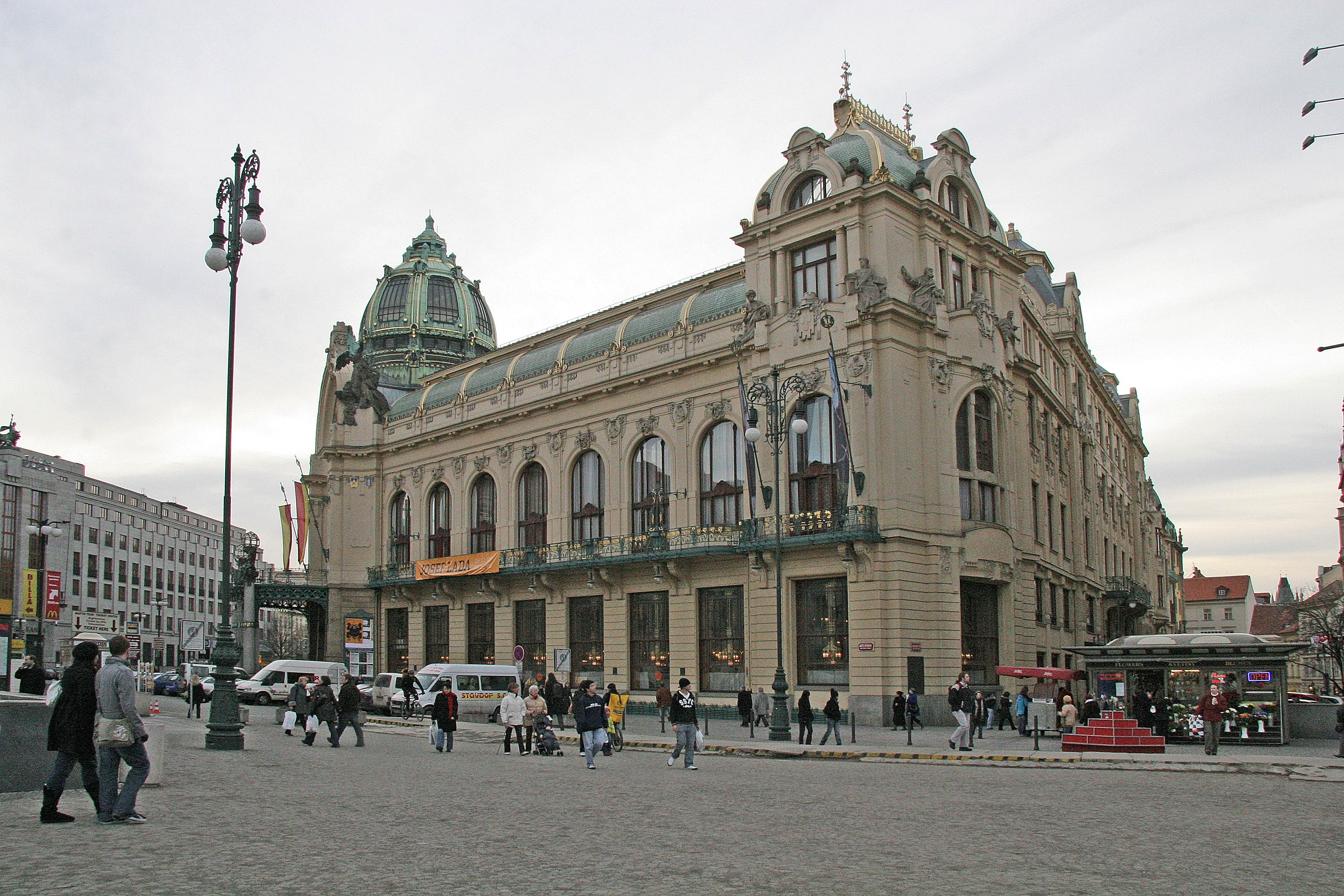 Obecní dům na náměstí Republiky v praze